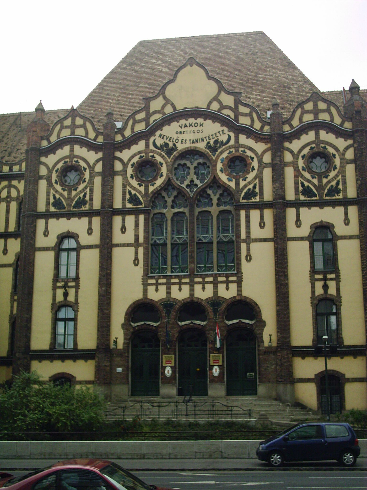 Vakok Intézete, Budapest, Hungária körút. Épült Baumgarten Sándor (1864–1928) és Herczegh Zsigmond (1848–1914) tervei szerint 1907-ben